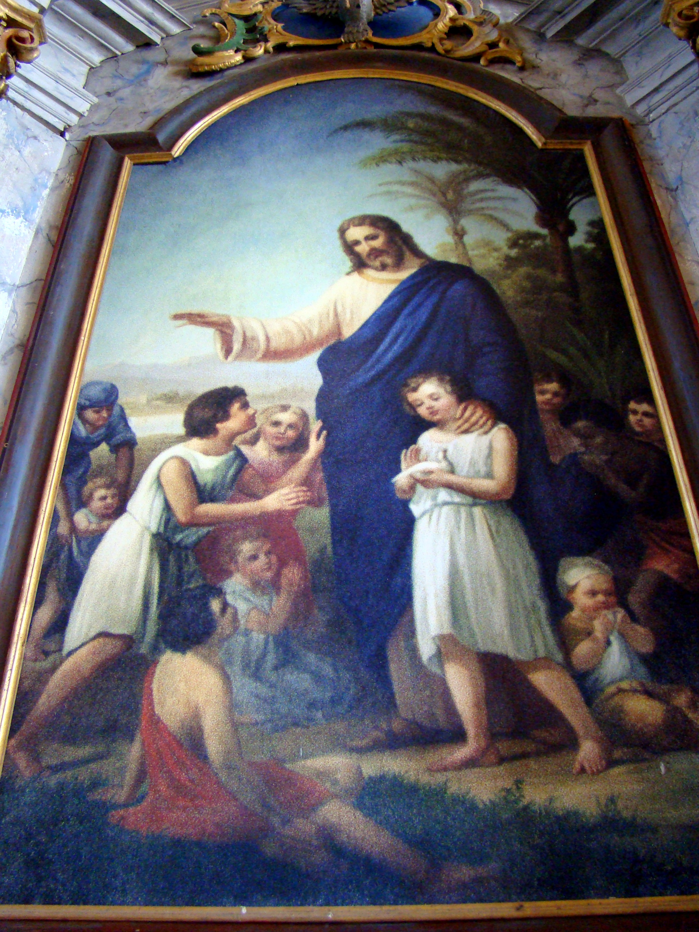 Biserica evanghelică, sat Rodbav; comuna Șoarș 115 sec. XIII-XIX 01